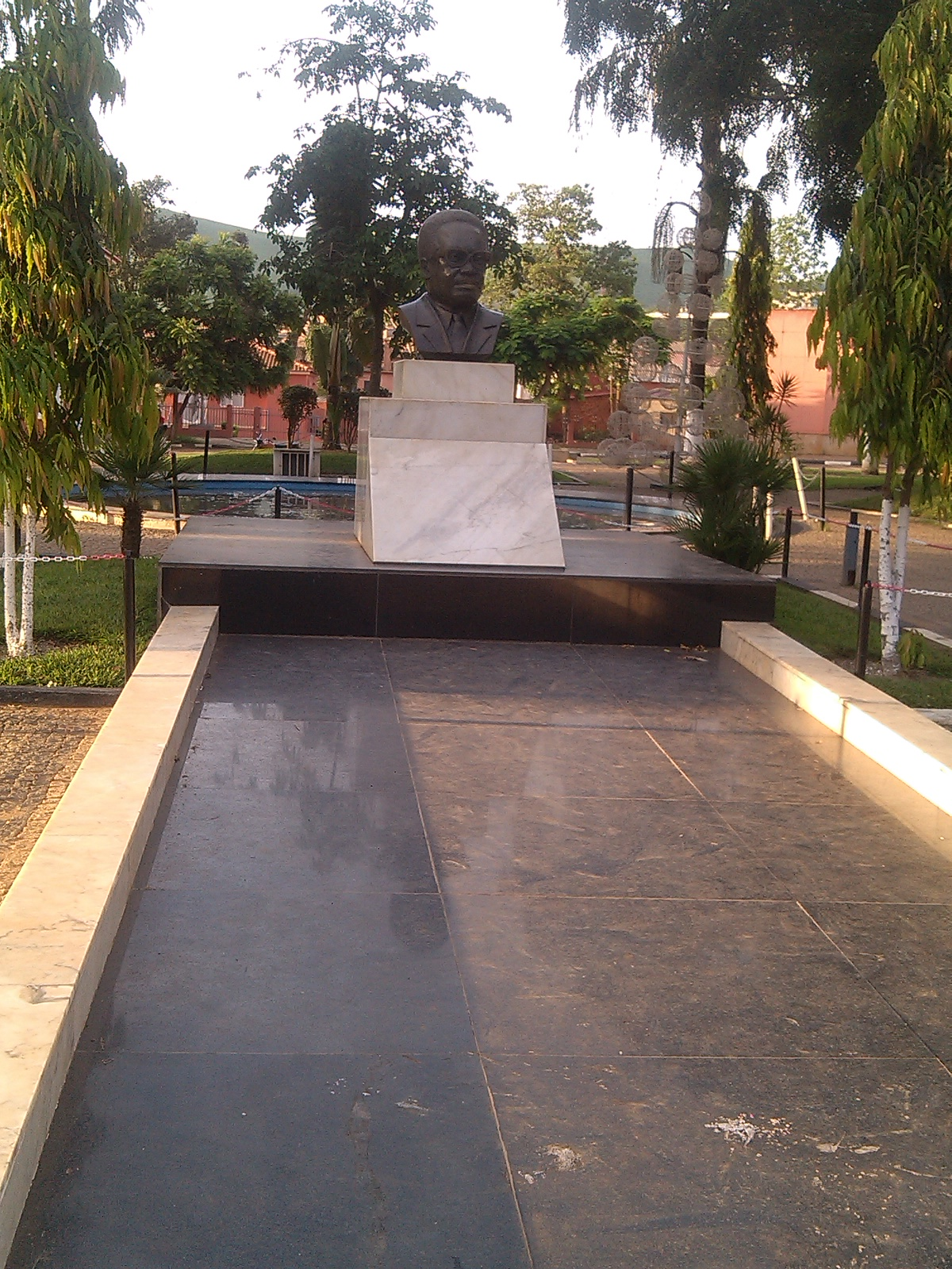 Estátua do primeiro presindente da República de Angola Dr. António Agostinho Neto, localizado no Largo Dr. António A. Neto na província do Kwanza Norte, município do Cazengo